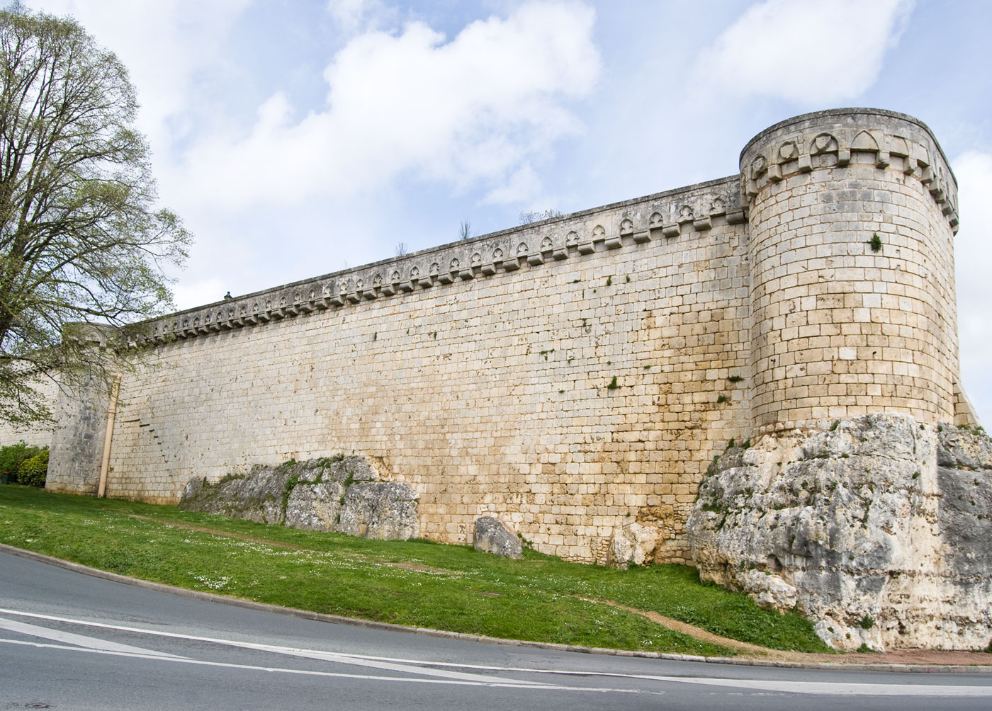 Les remparts du parc de Blossac de Poitiers, coté sud-ouest